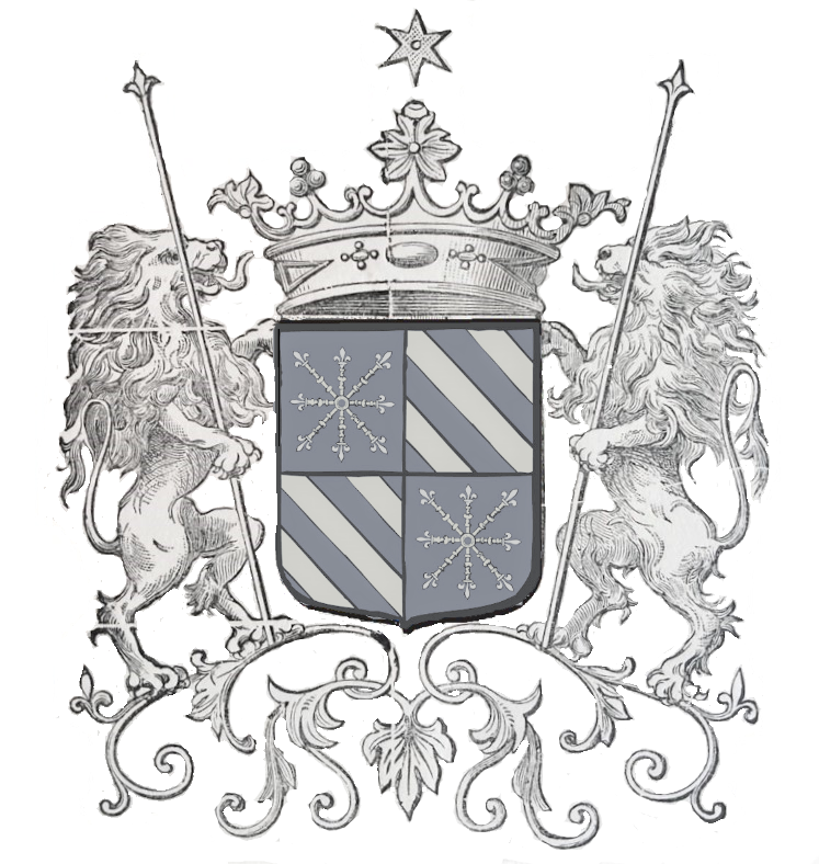 Blason branches du Perche et de Mortain : Écartelé d'azur à huit rais d'escarboucle pommetés et fleurdelisés d'or, et du premier à trois bandes du second.